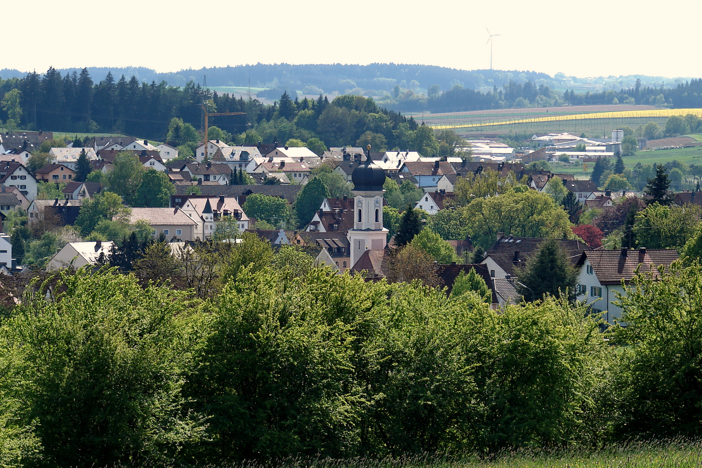 Der Markt Au in der Hallertau liegt im Norden des oberbayerischen Landkreises Freising im südlichen Bereich der Hallertau.